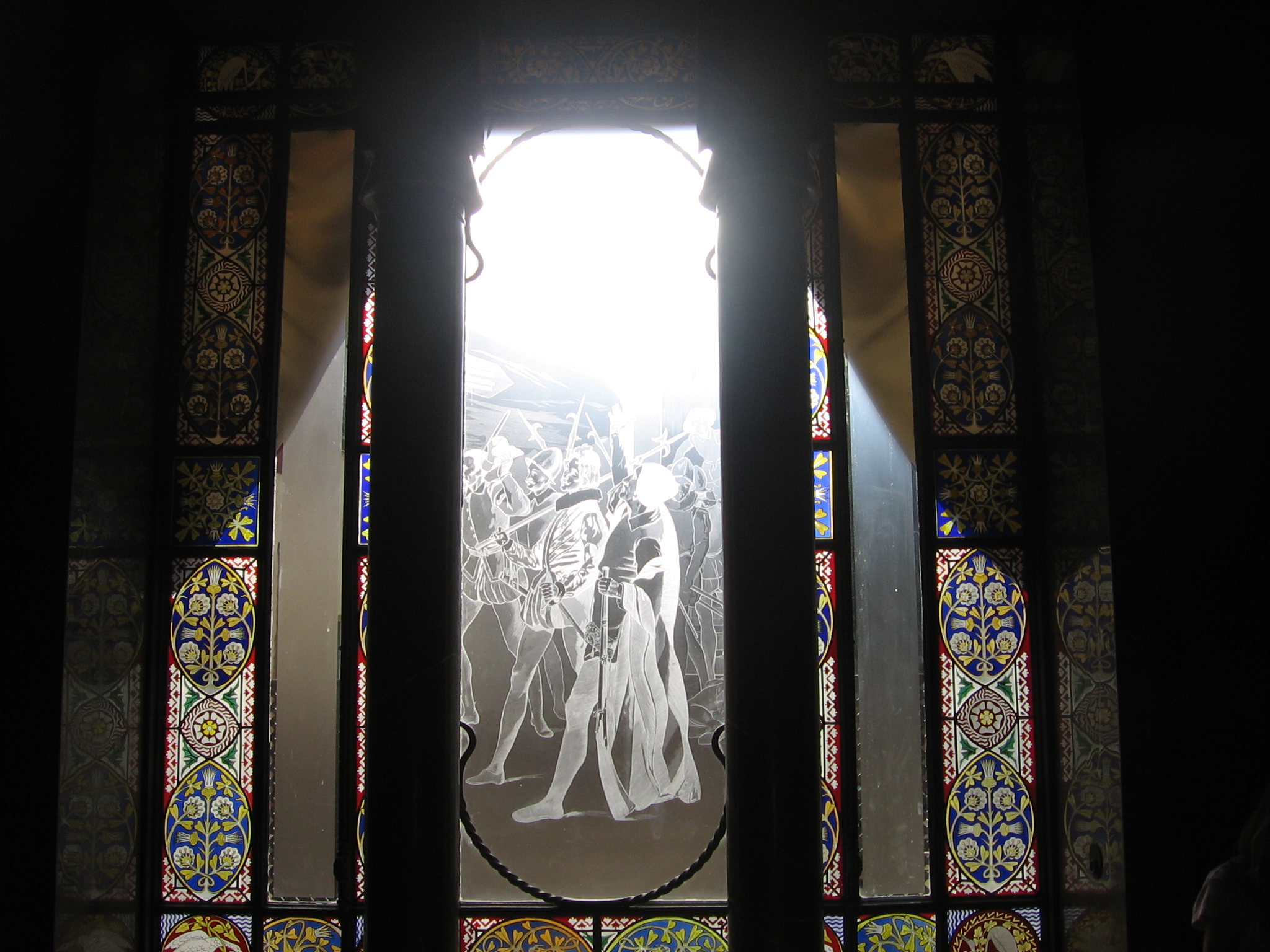 Vitral de la sala de confianza del Palacio Güell.